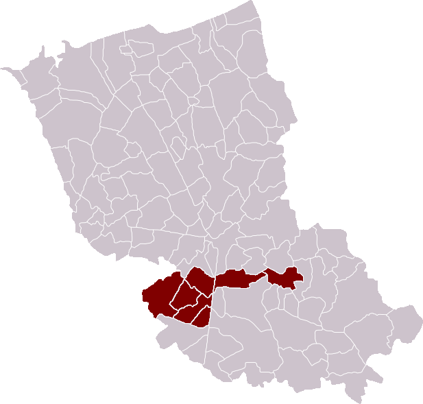 Communauté de communes de l'Houtland: Locatie in arrondissement Duinkerke. Zelfgemaakt. Location in the arrondissement of Dunkirk. Self made. Localisation dans l'arrondissement de Dunkerque. Fait moi-même.